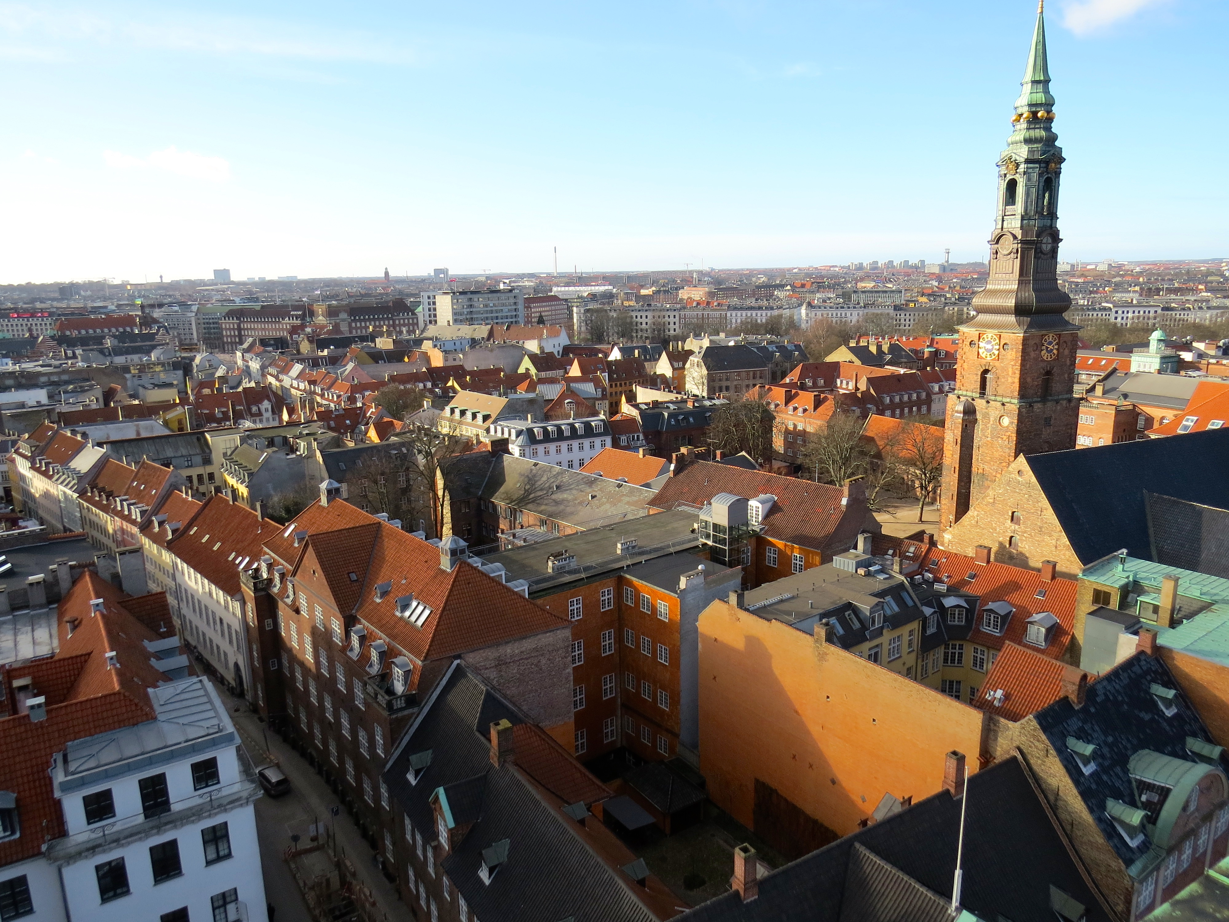 Pisserenden i København